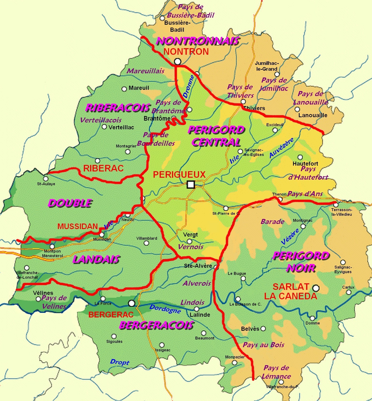 Localisation du Périgord central sur la carte des pays traditionnels du Périgord.